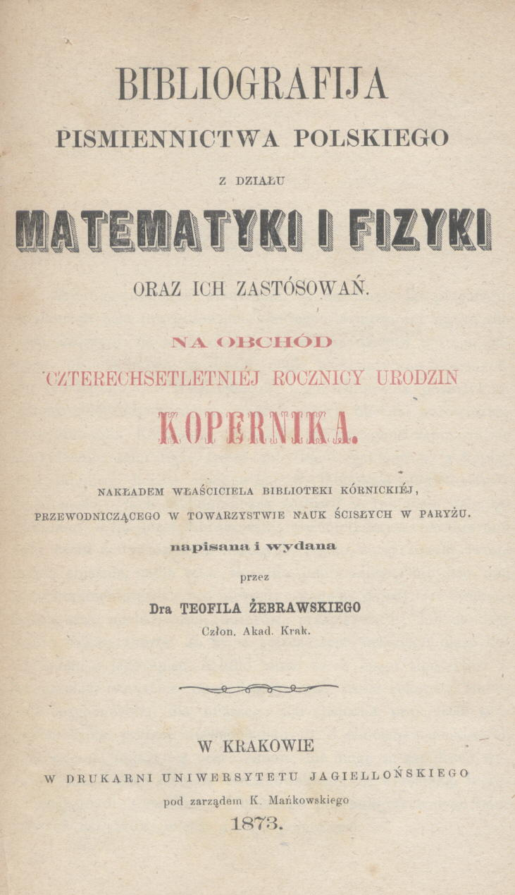 Strona tytułowa pracy Teofila Żebrawskiego Bibliografija piśmiennictwa polskiego z działu matematyki i fizyki oraz ich zastósowań